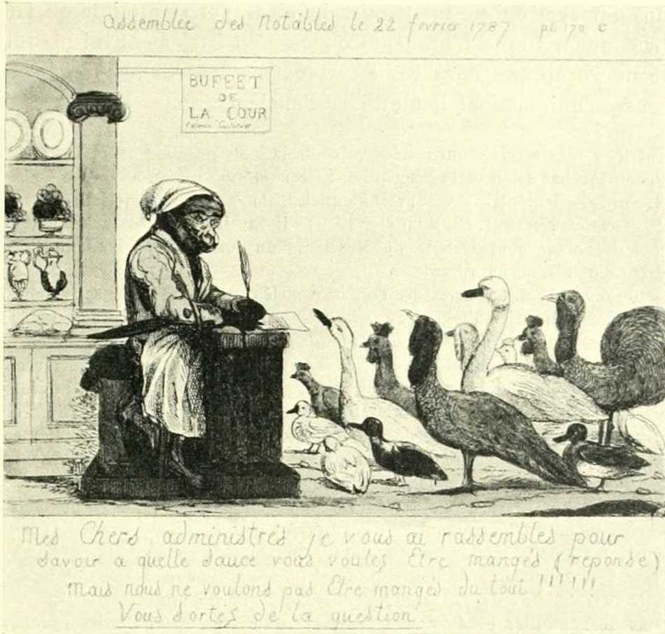 Karikatur eines anonymen Künstlers zur französischen Notabelenversammlung von 1787